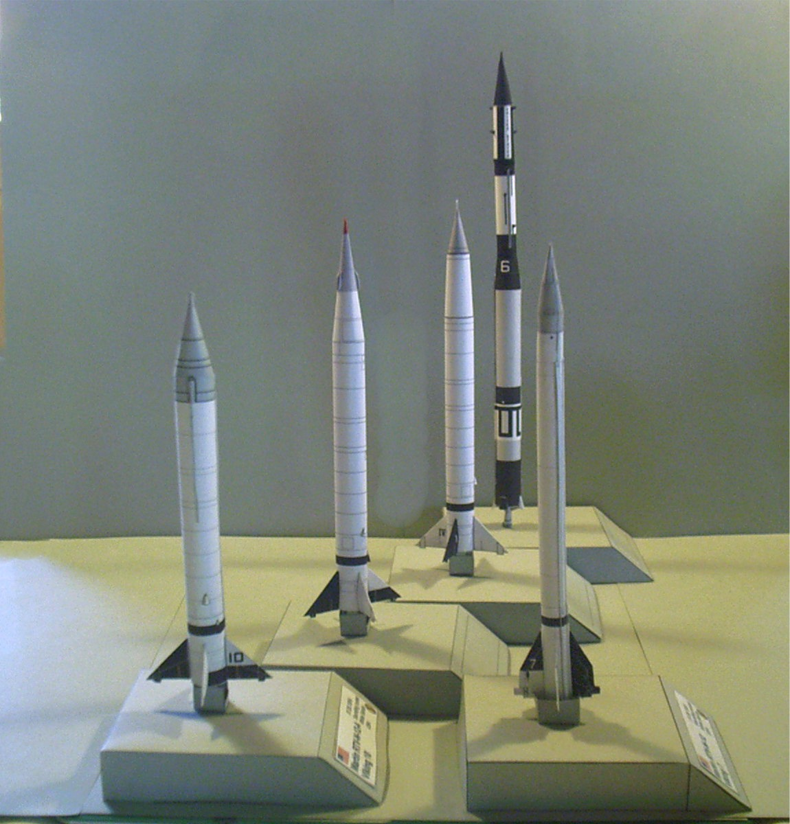 Eksempel på gratis papirmodeller. Skalamodeller af Viking og Vanguard raketter i målestoksforholdet 1:96 fra NielsPapermodels.